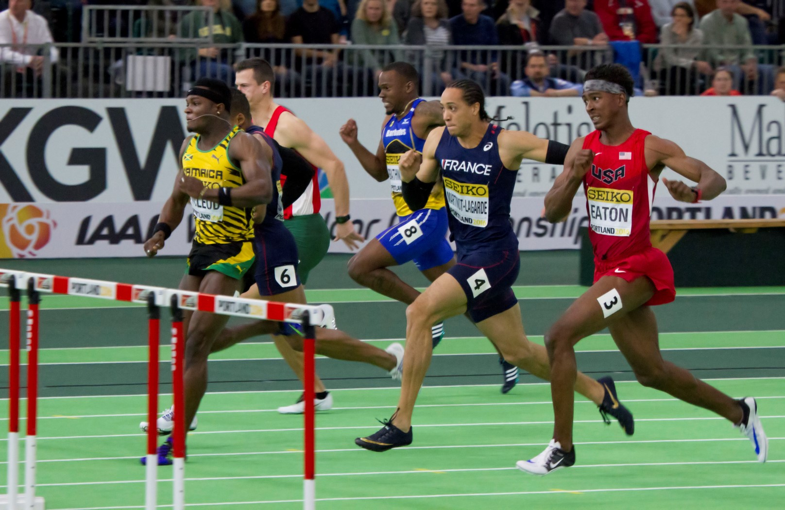 5201 finale 60mH